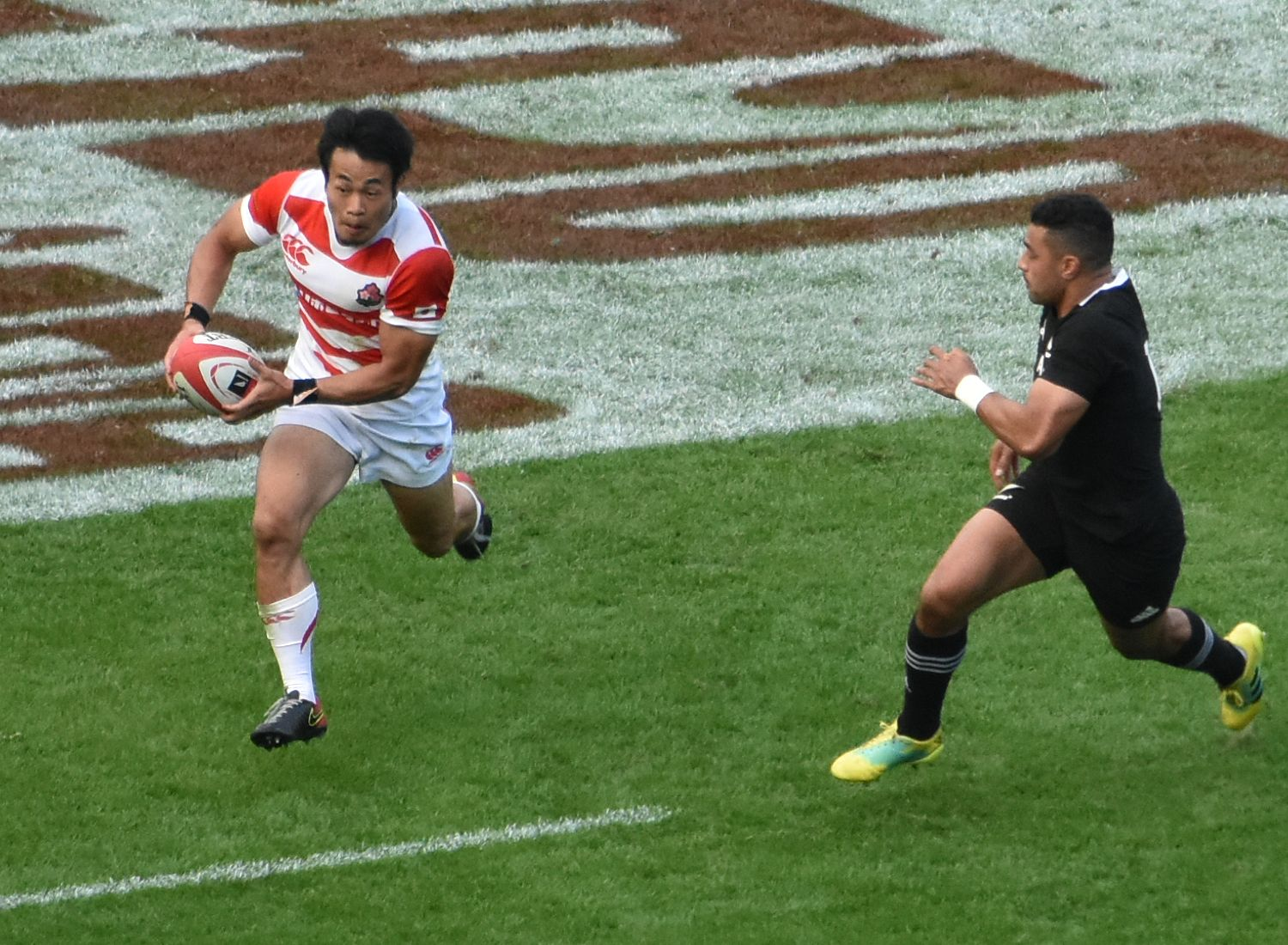 味の素スタジアム 福岡堅樹